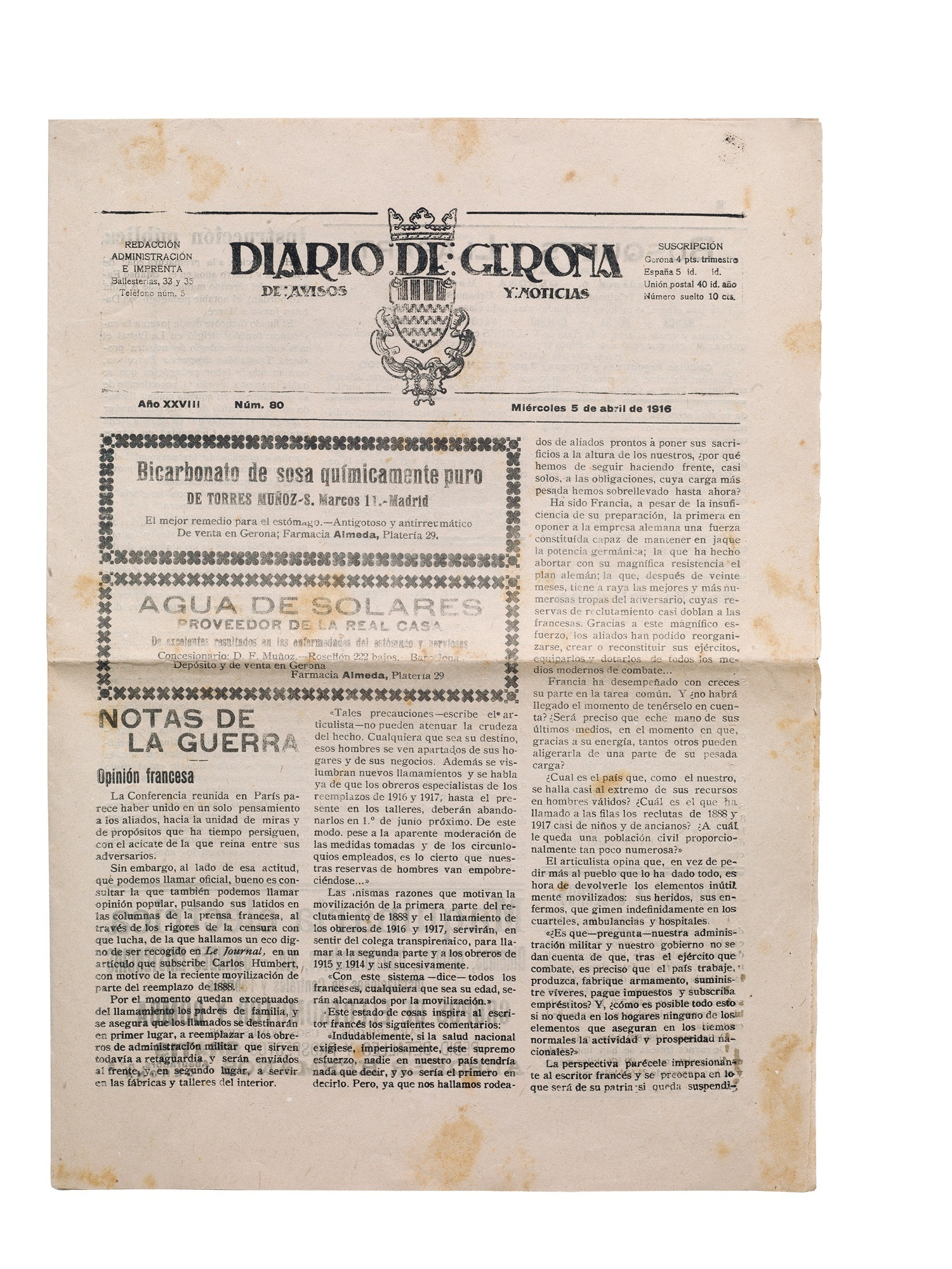 Pàgina impresa del Diari de Girona, Impremta Masó. Girona